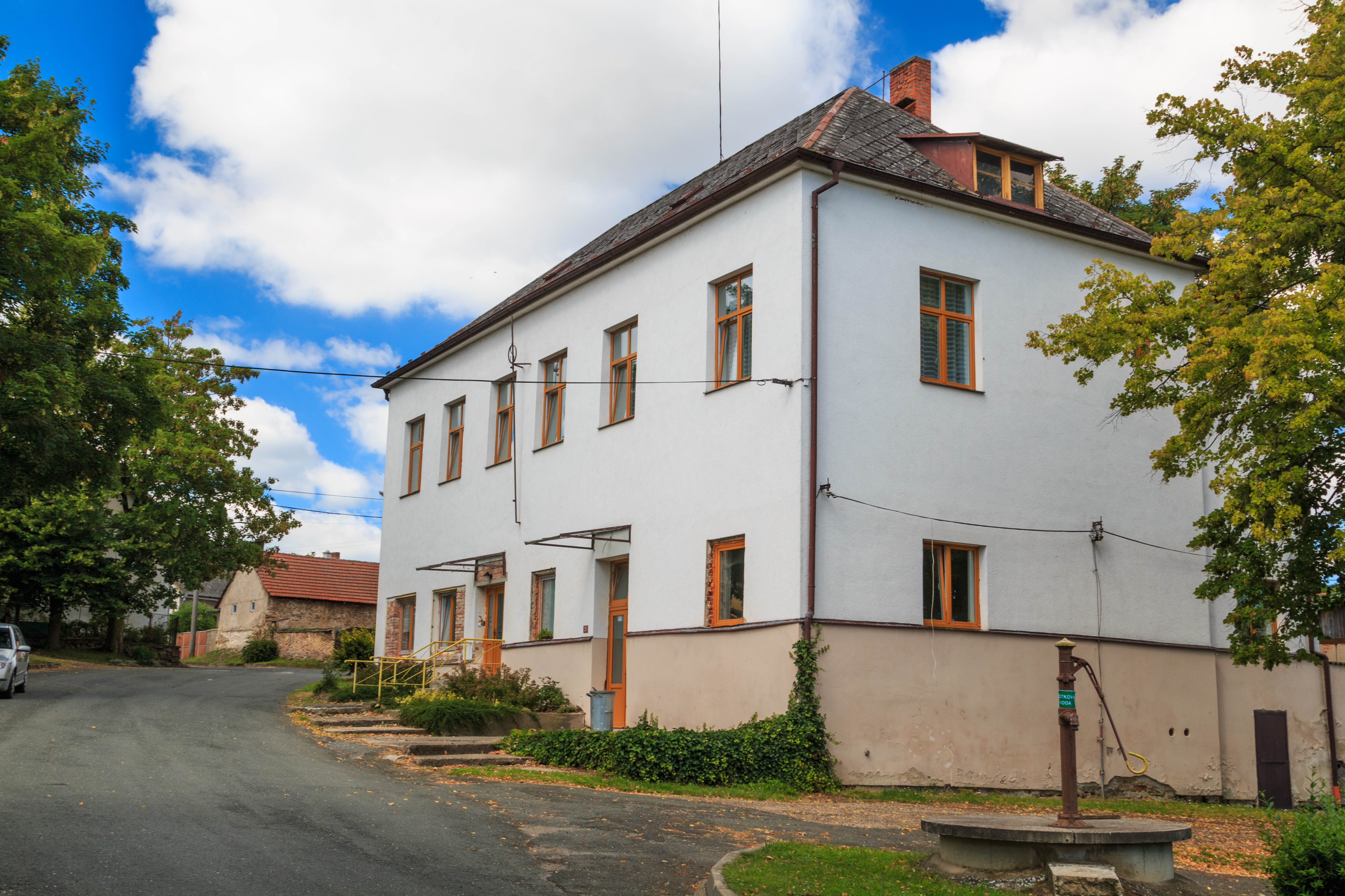 Bahno čp. 31